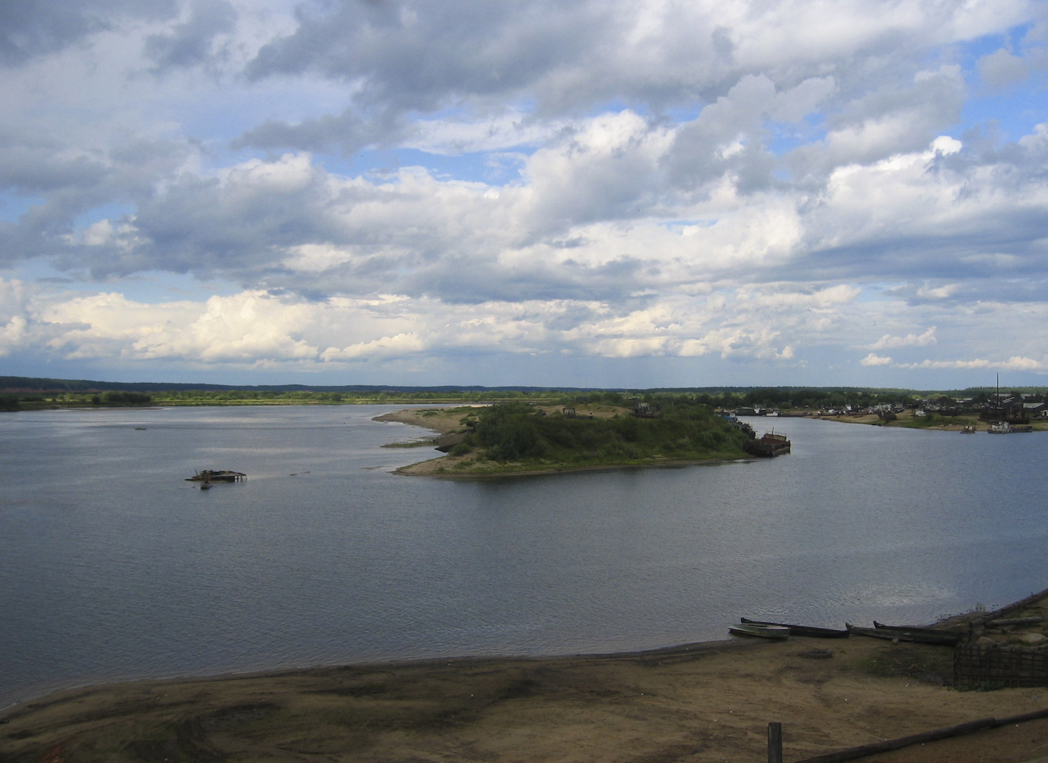 Leshukonskoye, Arkhangelsk Oblast, Russia, 164670